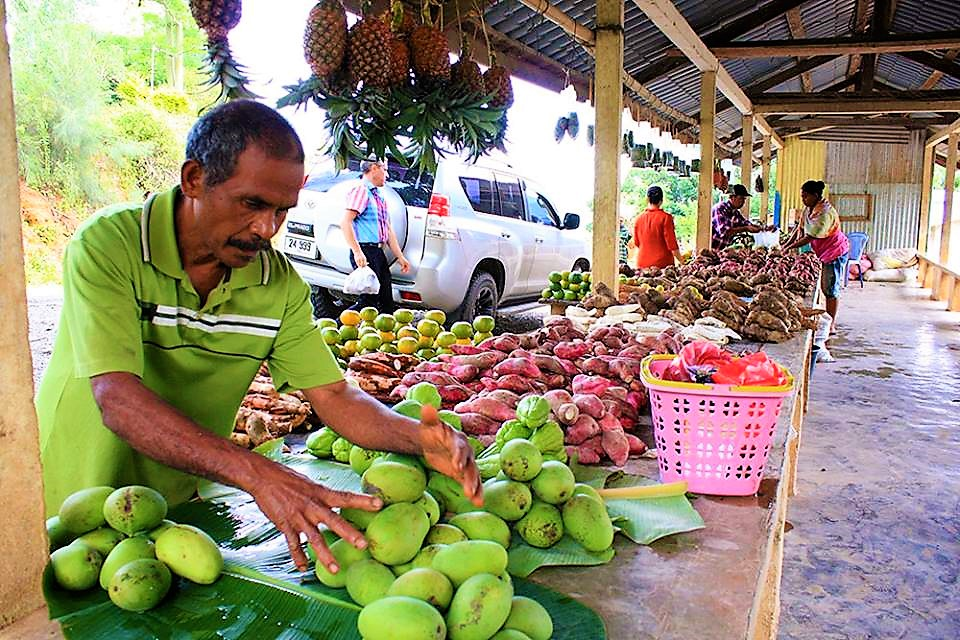 Obst und Gemüse in Gleno